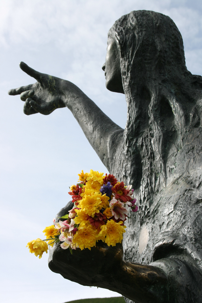 ...con violeticas de mayo con carneritos de enero inviernos del ventisquero farallon de los veranos con frios cordilleranos con riscos y ajetreos se te van poniendo feos los deditos de tus manos..